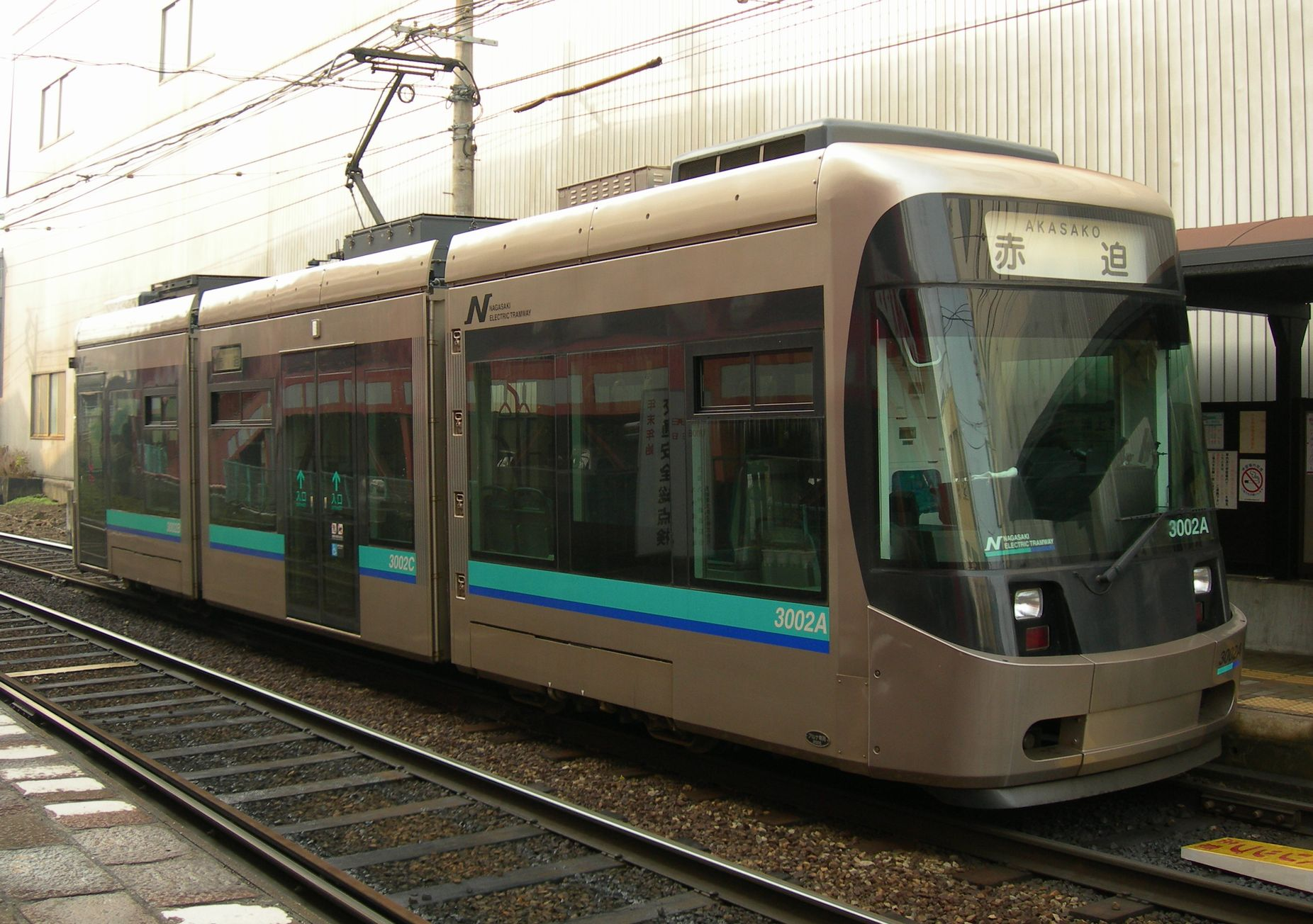 長崎電気軌道3000形